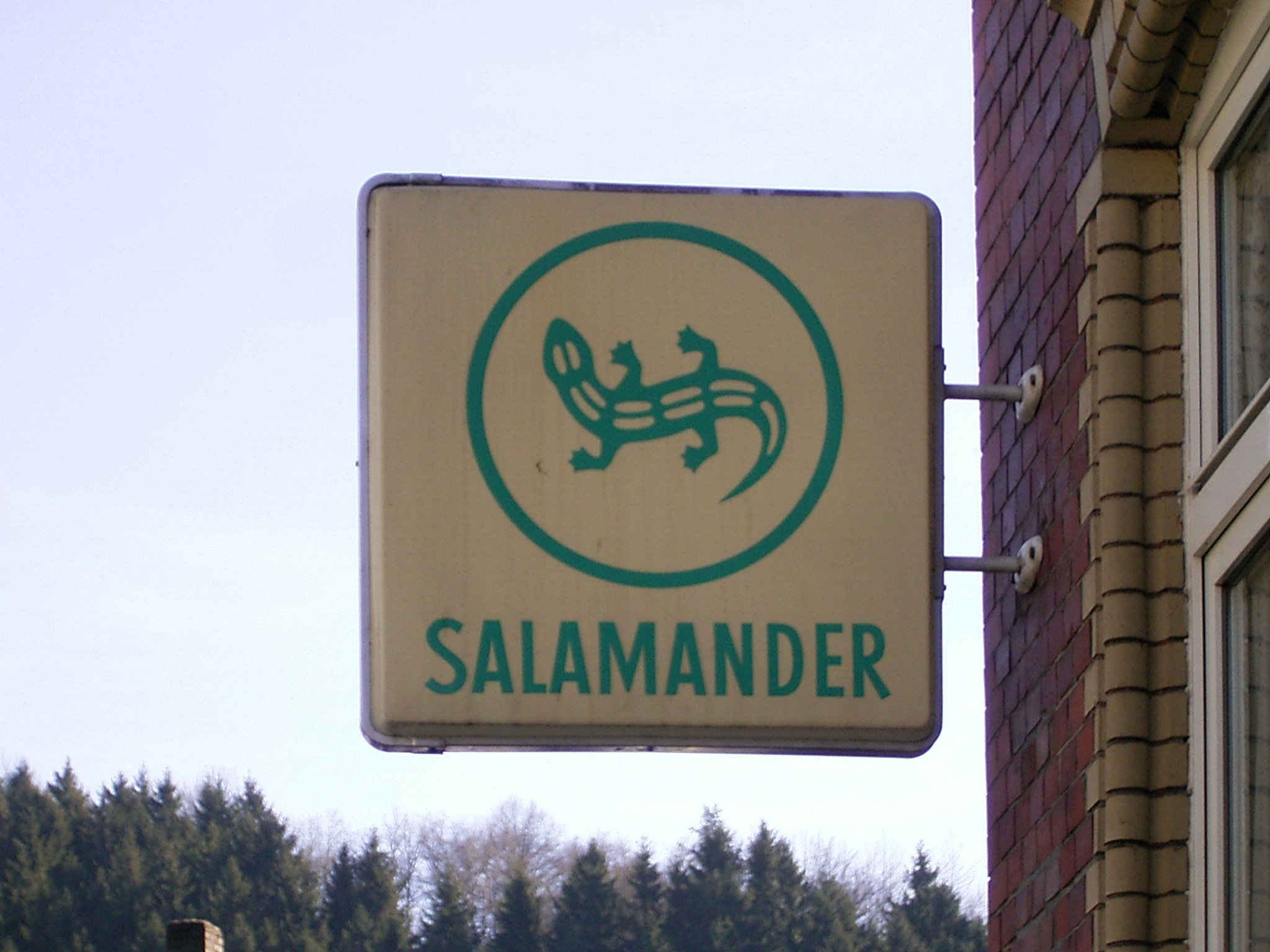 Morsbach